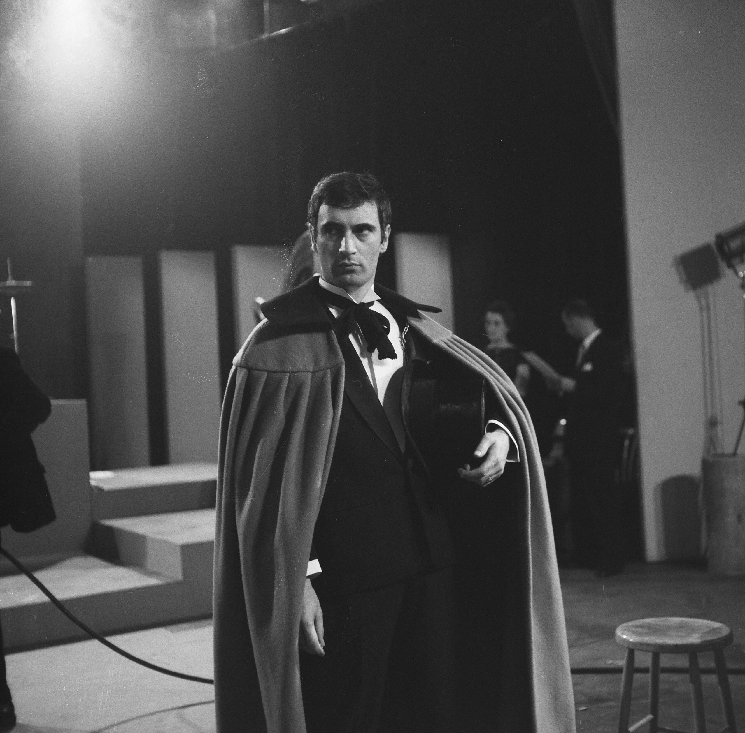 Collectie / Archief : Fotocollectie Anefo Reportage / Serie : [ onbekend ] Beschrijving : Televisieprogramma "In de hoofdrol" , Maxim Hamel Datum : 29 oktober 1960 Trefwoorden : TELEVISIEPROGRAMMAS Persoonsnaam : HAMEL MAXIM Fotograaf : Lindeboom, Henk / Anefo Auteursrechthebbende : Nationaal Archief Materiaalsoort : Negatief (zwart/wit) Nummer archiefinventaris : bekijk toegang 2.24.01.03 Bestanddeelnummer : 911-7265